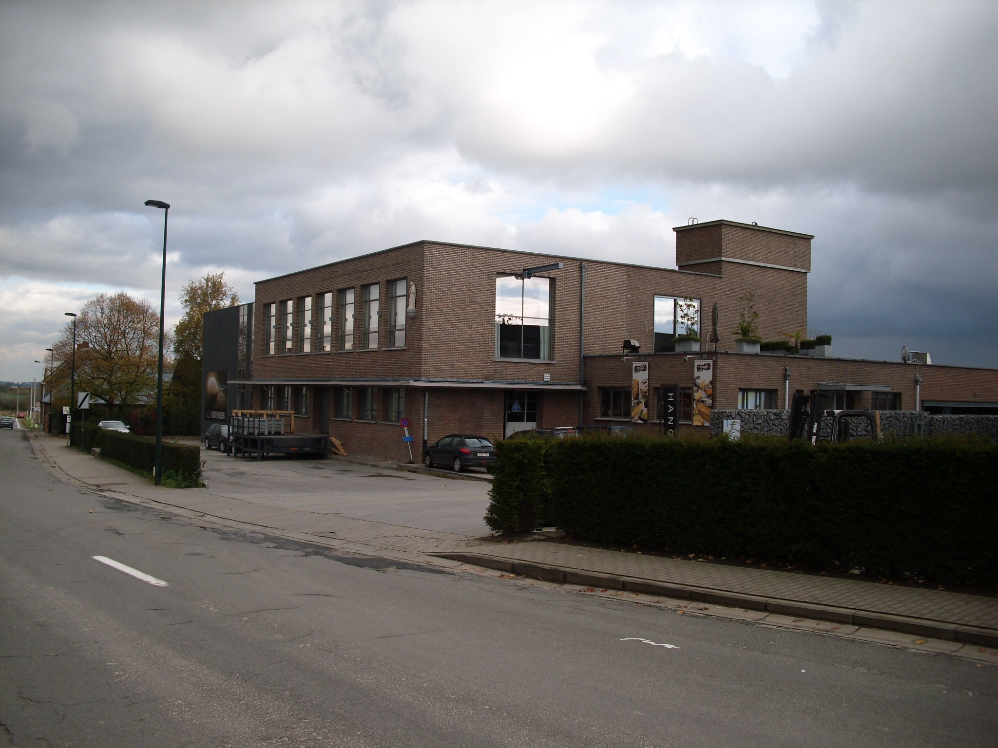 Voormalige melkerij De Maagd - Dorpsstraat - Sint-Maria-Horebeke - Horebeke - Oost-Vlaanderen - Vlaanderen - België